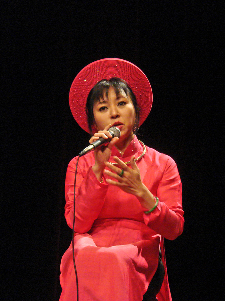 Concert du vendredi 9 novembre, dans l'auditorium du musée Guimet à Paris. Huong Thanh Trio, Musique traditionnelle du Vietnam avec Mieko Miyazaki, invitée Avec Huong Thanh (vocal), Hong Nguyen et Hao Nhiên Pham (Dan Tranh, Dan Bau, Dan Nguyet, T’rung, Dan Nhi, Dan Ty Ba Song loan, Senh tien, De drum) Huong Thanh a proposé une interprétation de la musique traditionnelle des trois régions du Vietnam : celle du Nord, voluptueuse et céleste, celle du Sud, nostalgique et touchante, en passant par celle du Centre, majestueuse et impériale.